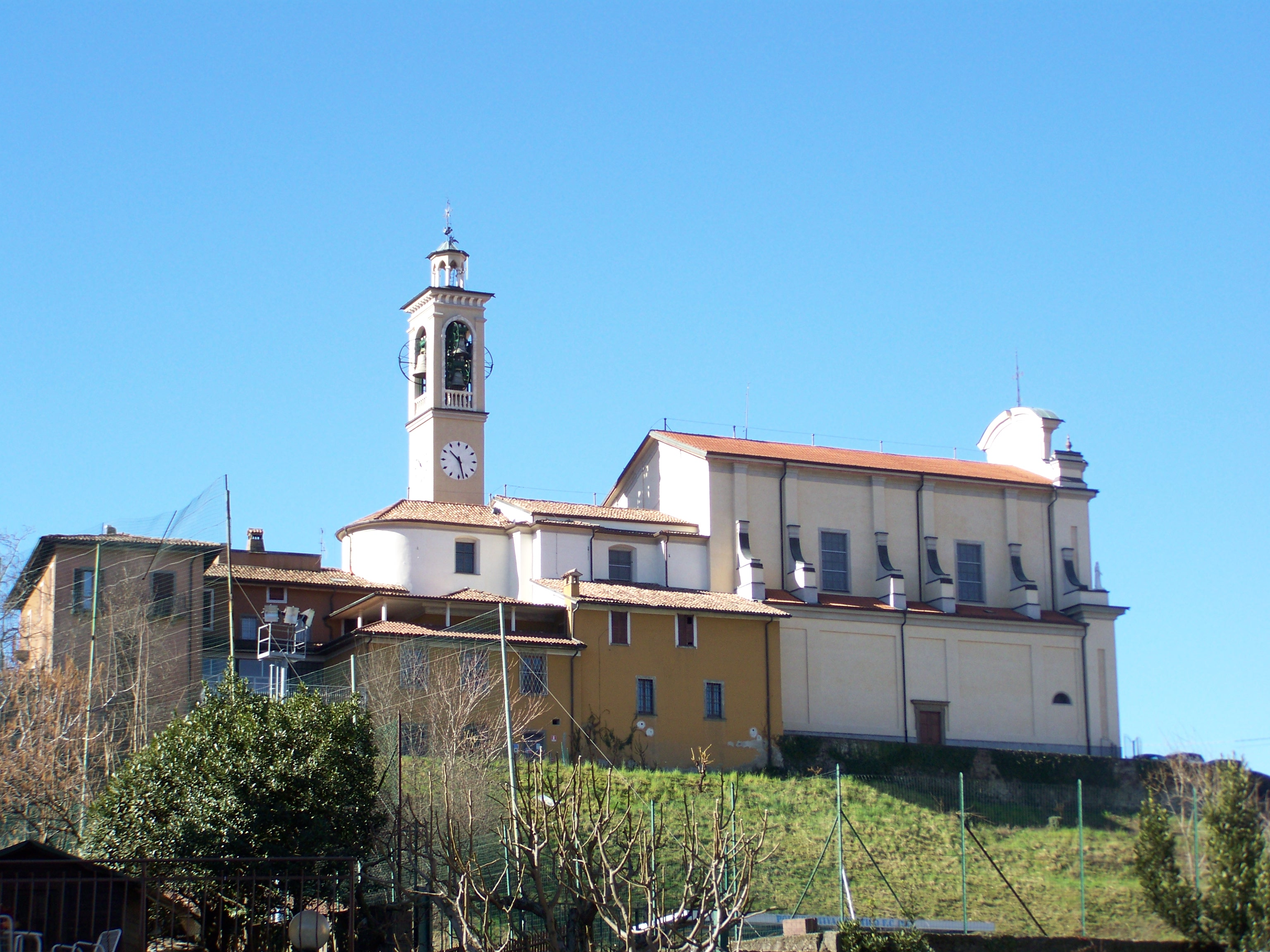 Lato settentrionale della Parrocchiale di Paratico dedicata a Santa Maria Assunta